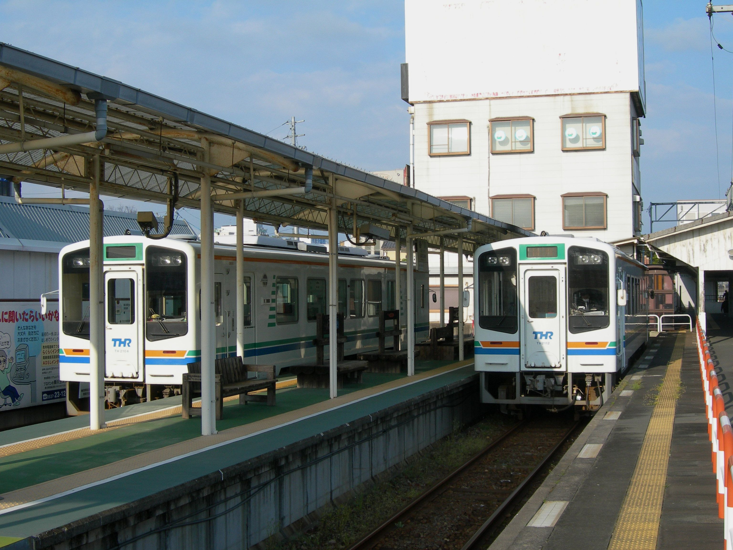 掛川駅 天竜浜名湖線ホーム